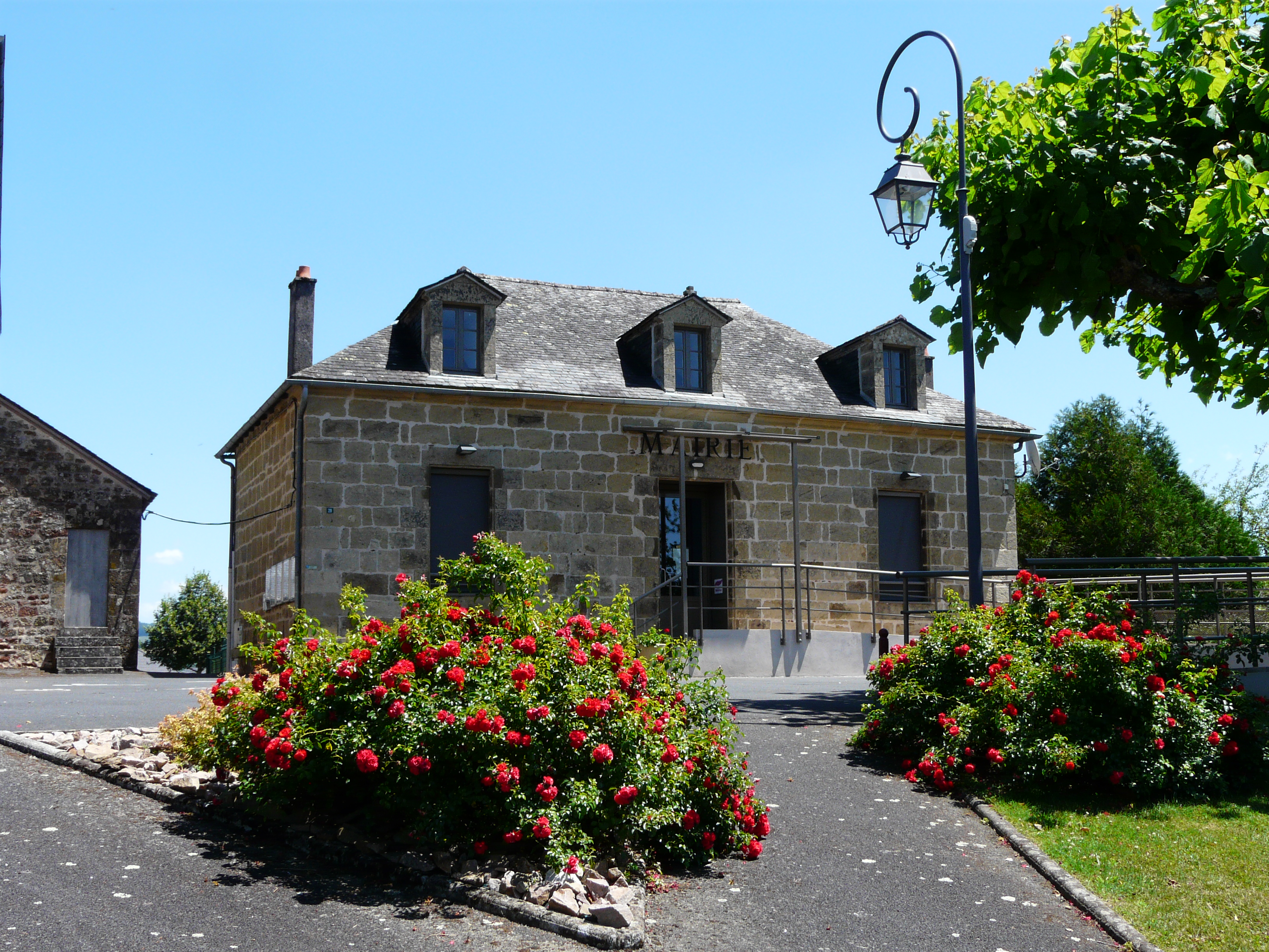 La mairie de La Chapelle-aux-Brocs, Corrèze, France.